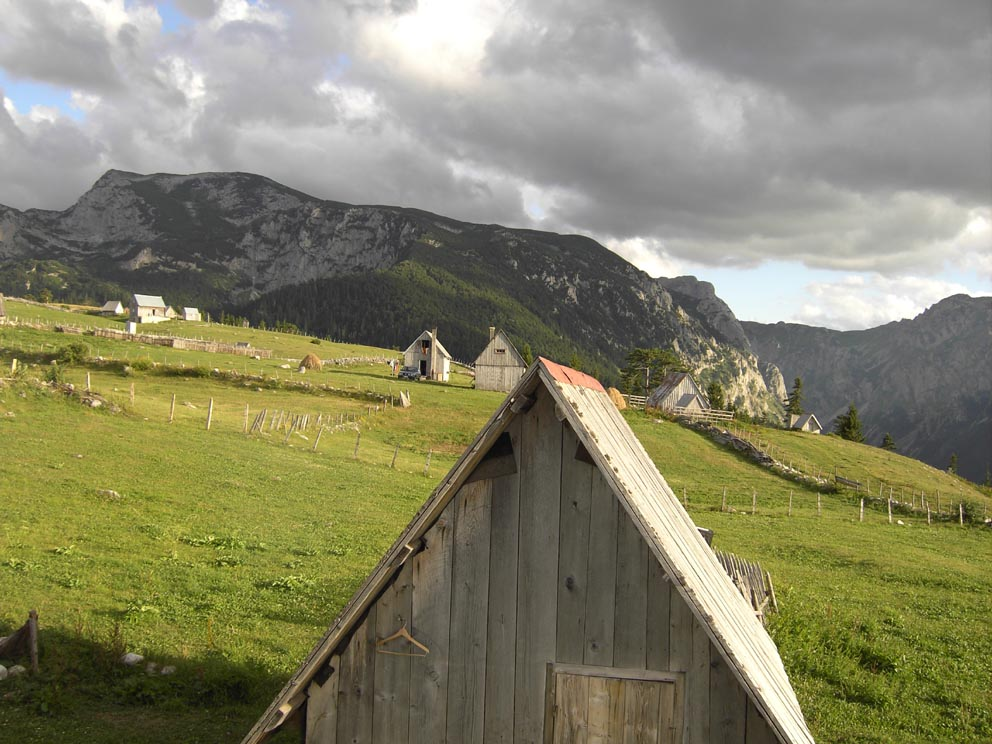 Description du contenu : Vue du village de Mala Crna Gora « œuvre personnelle » Date de création : Mars 2005. Author : Alexandar Petrovic